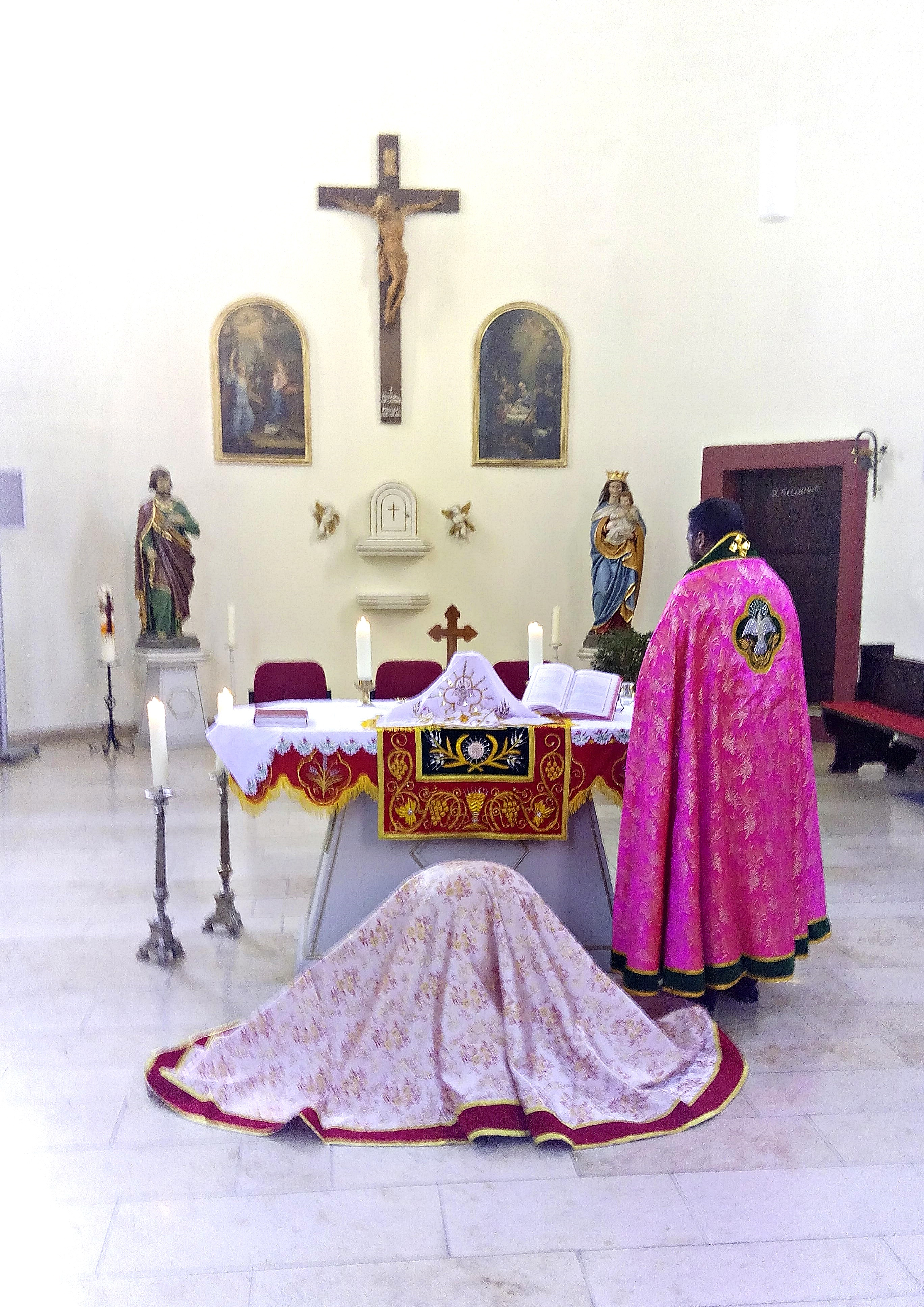 Heidelberg-Wieblingen, alte St. Bartholomäus-Kirche, Altarraum während einer syro-malankarisch-katholischen Messfeier.